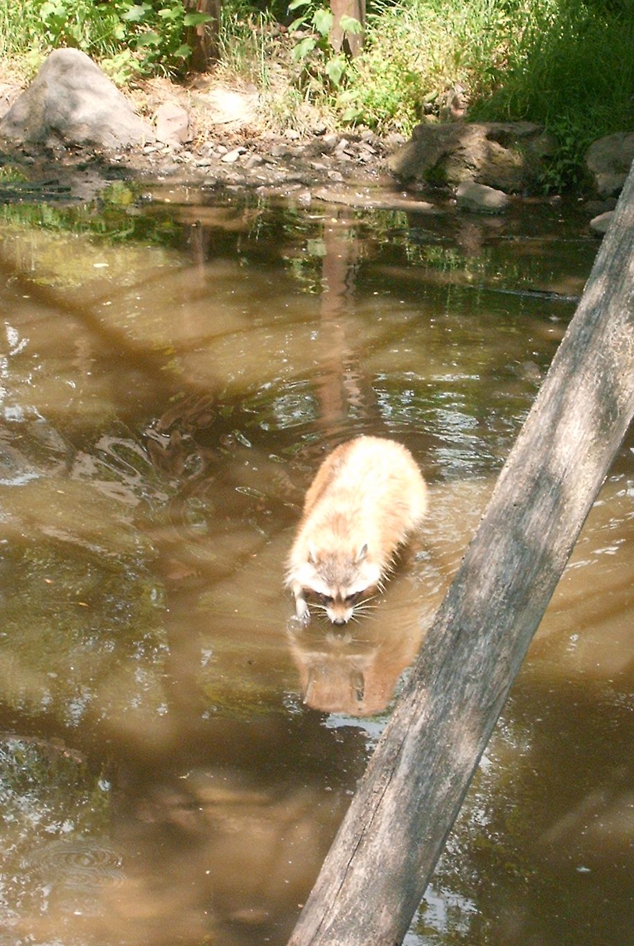 Procyon lotor at Jászberény Zoo